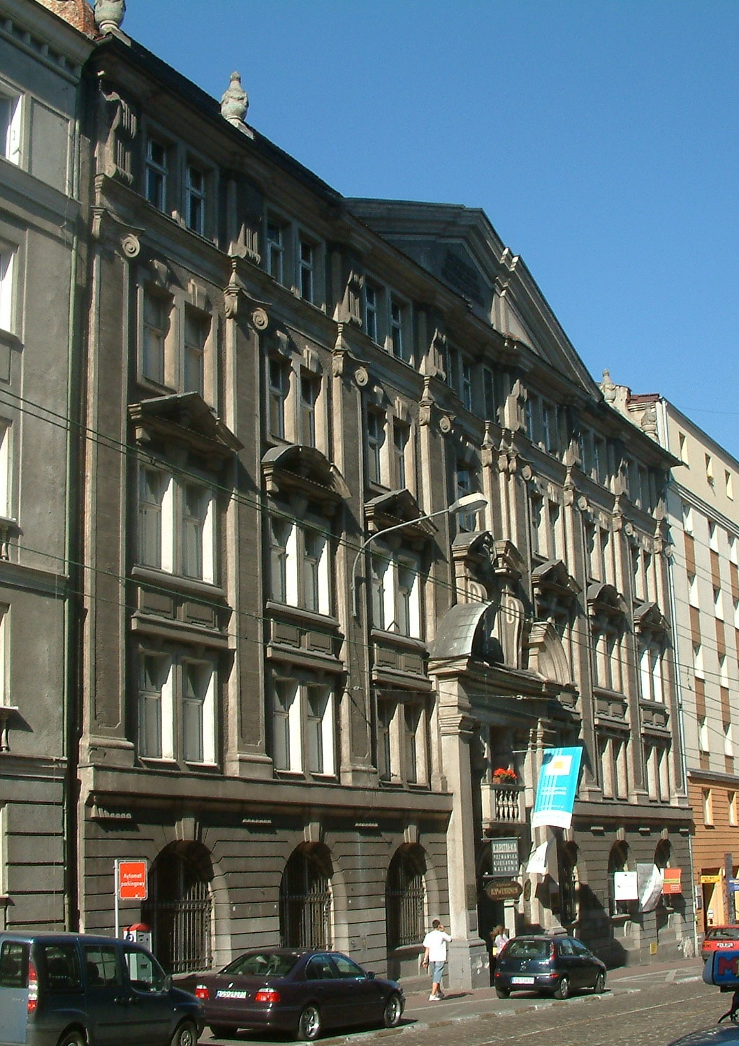 Seat of Poznańskie Towarzystwo Przyjaciół Nauk, Poznań